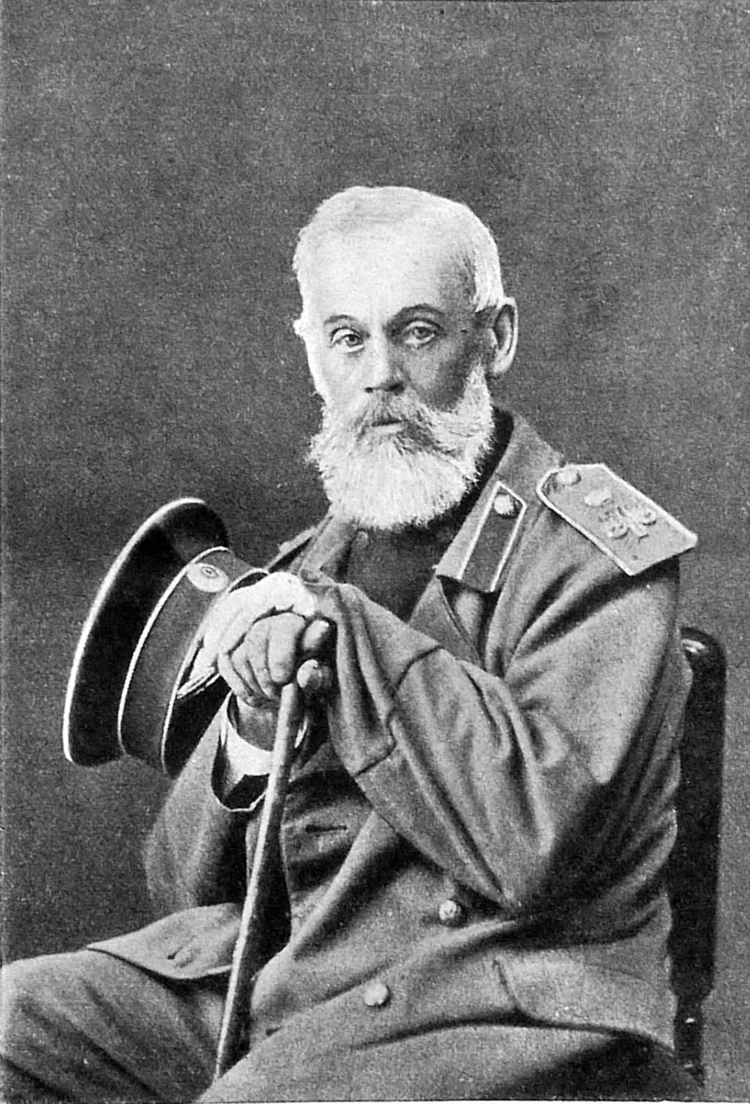 Милютин, Дмитрий Алексеевич Эта фотография была использована для иллюстрирования статьи «Милютины» опубликованной в пятнадцатом томе «Военной энциклопедии», который был издан книгоиздательским товариществом И. Д. Сытина в 1914 году в столице Российской империи городе Санкт-Петербурге. Более подробное описание к этому рисунку можно прочесть в указанной выше статье на сайте Русской Викитеки.